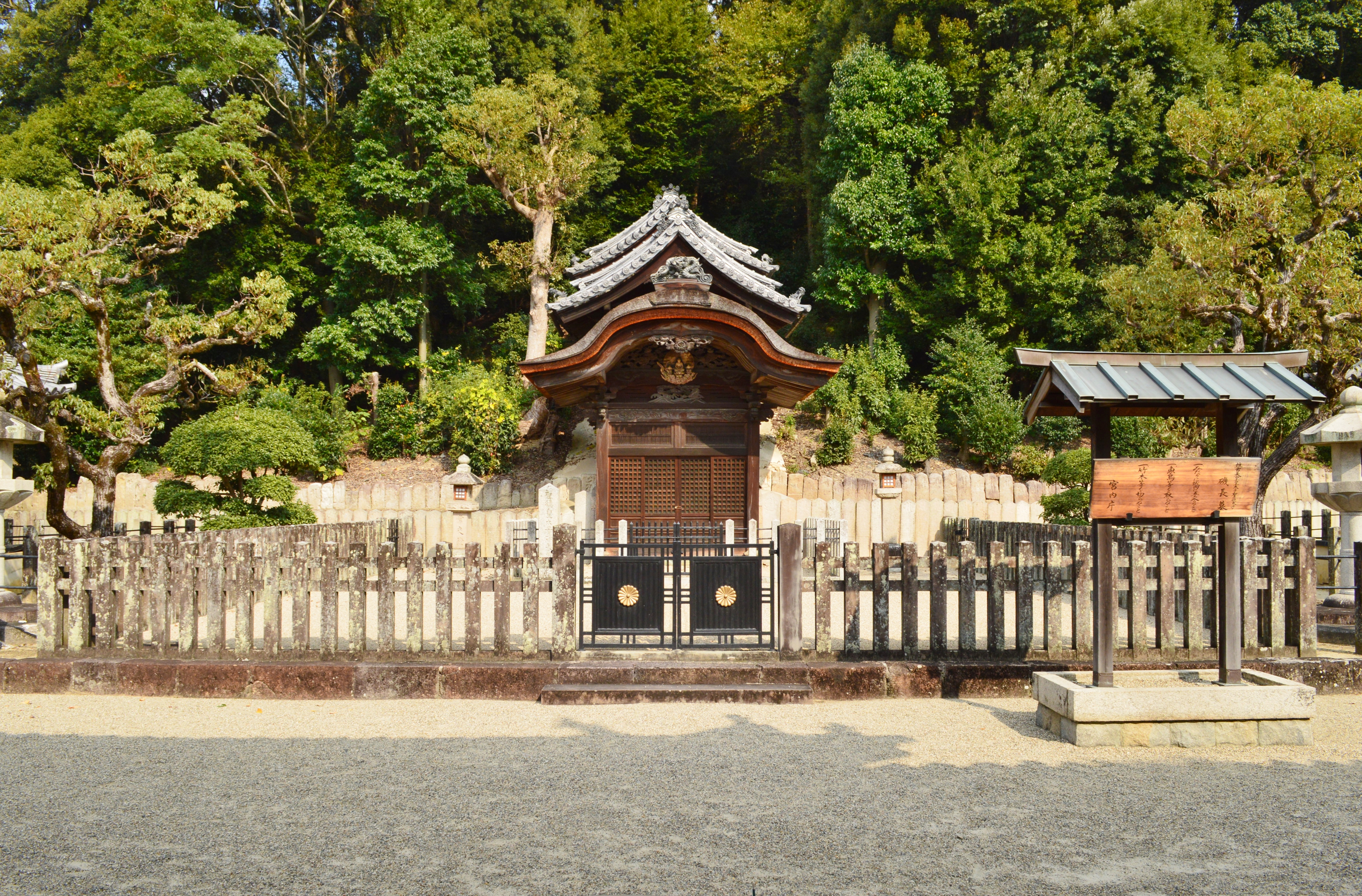 聖徳太子磯長墓 拝所